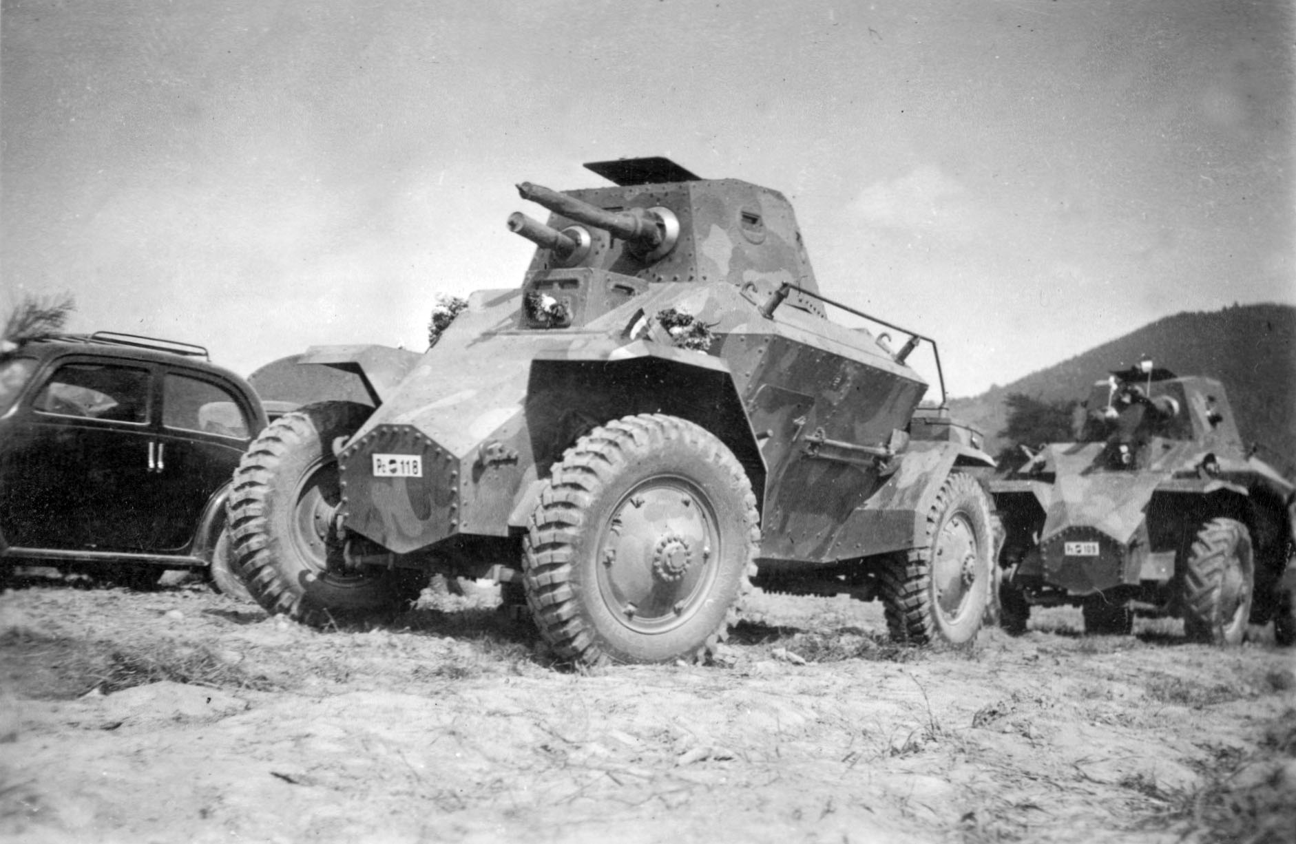 39M Csaba felderítő páncélgépjármű.